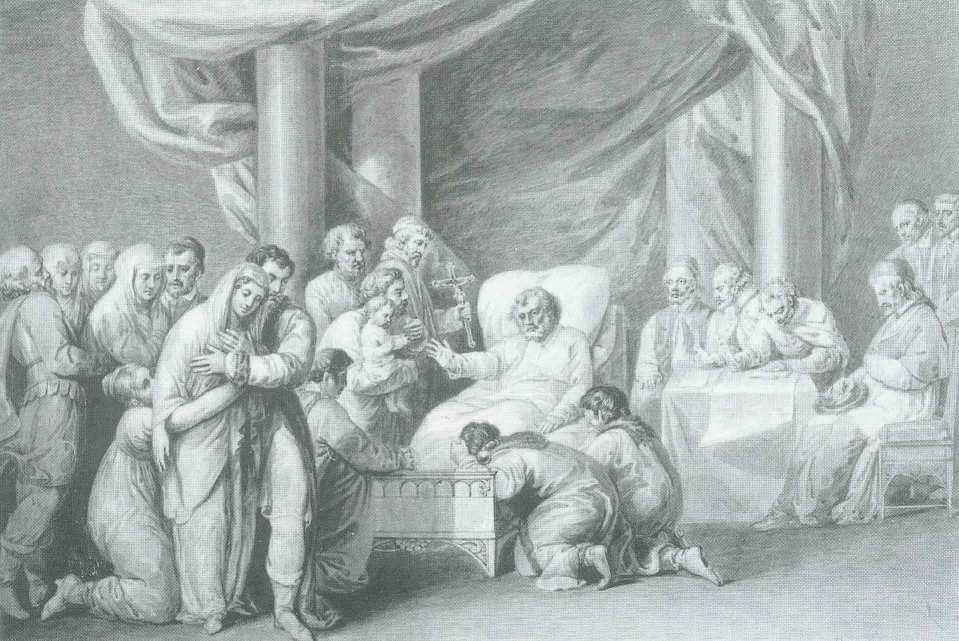 Śmierć Bolesława III